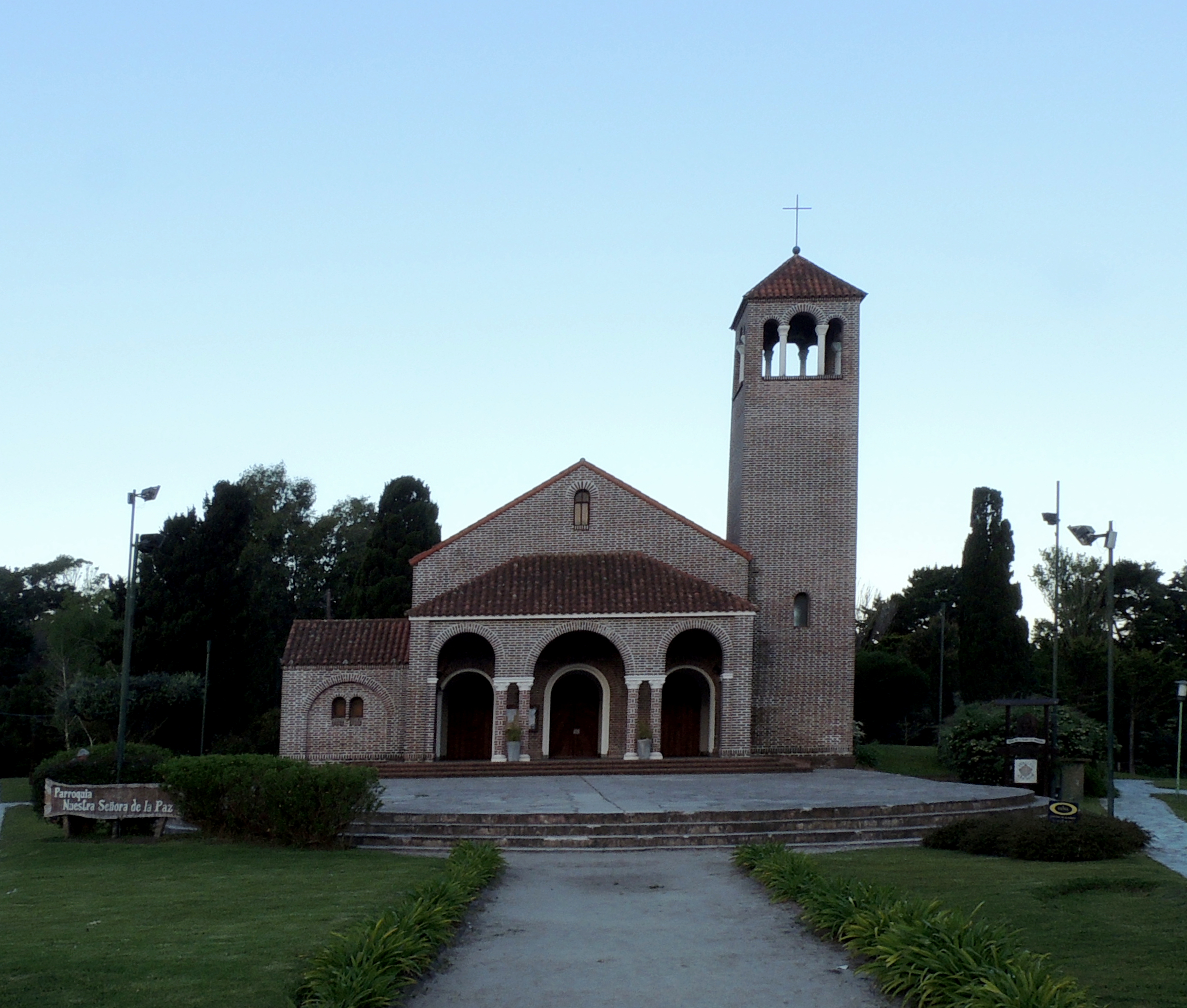 Iglesia de Nuestra Señora de la Paz, Pinamar, Argentina